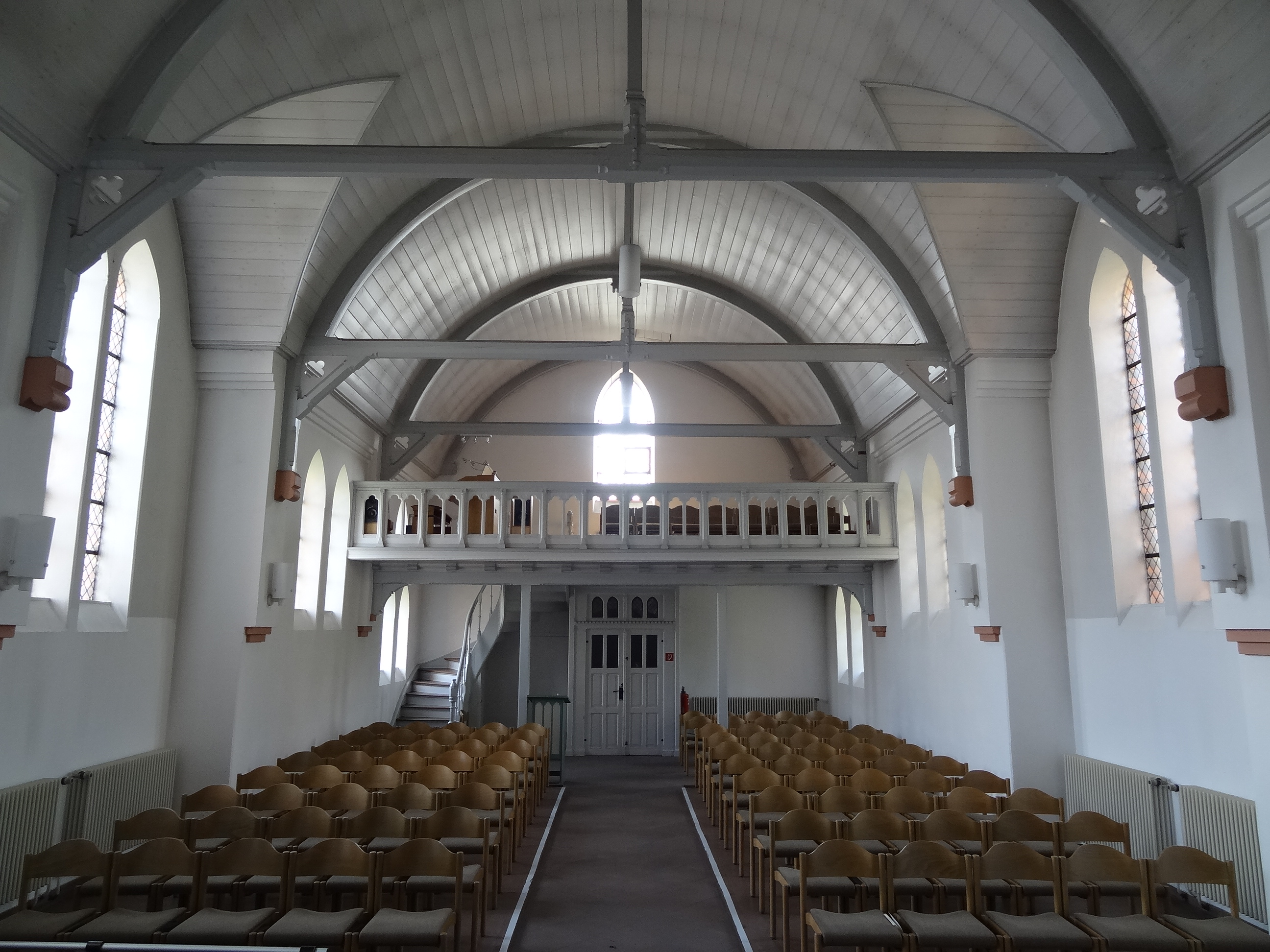 Friedhofskapelle Butzbach